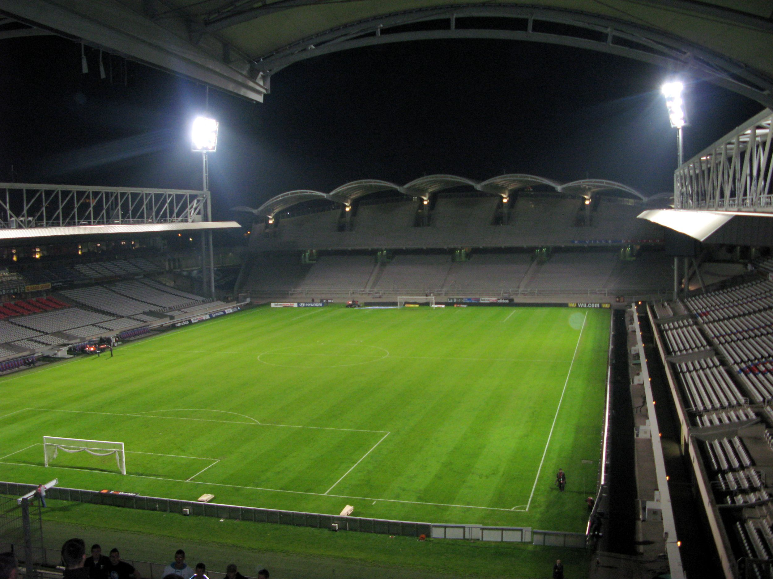 Stade de Gerland, Lion